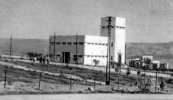 תחנת הכוח של טבריה בתכנון אלכסנדר ברוולד 1925